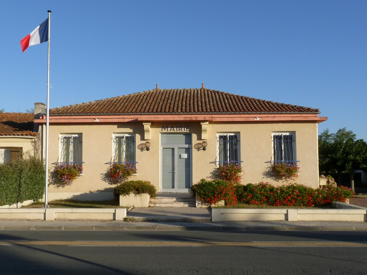 mairie de Grayan-et-l'Hôpital, Gironde, France